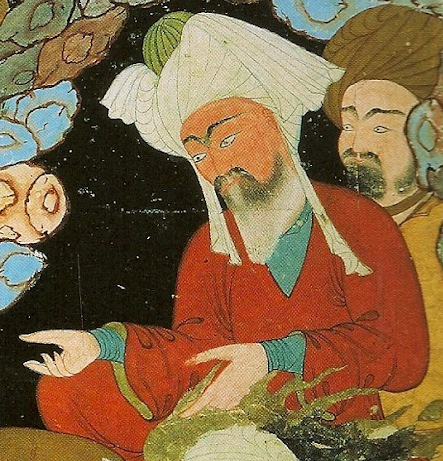 MAHOMA Y ABUBEKER EN LA CUEVA.- Miniatura turca . siglo XVII. Dresde, Biblioteca Nacional de Sajonia